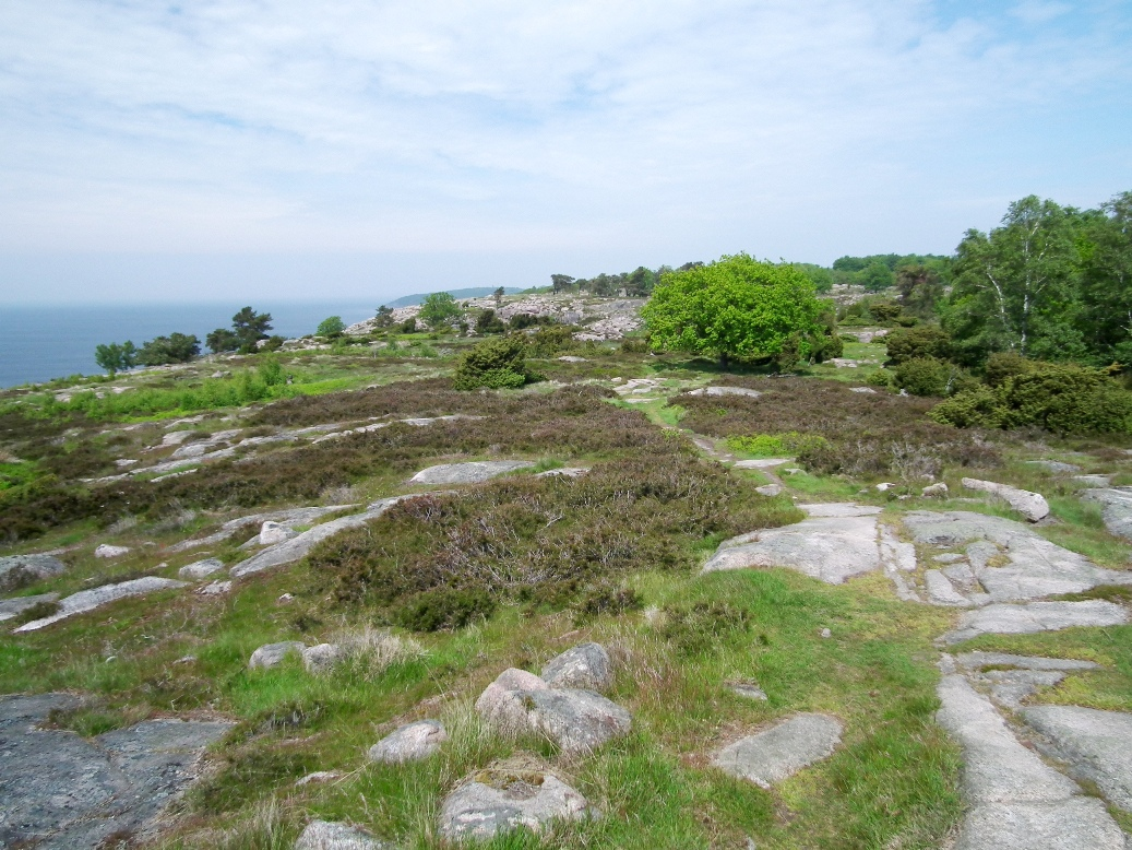 wzgórza Slotslyngen - widok na pólnoc